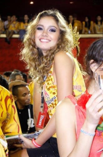 A atriz Sophie Charlotte assiste aos desfiles do Carnaval do Rio de Janeiro sem o namorado, Malvino Salvador, que está na Bahia.